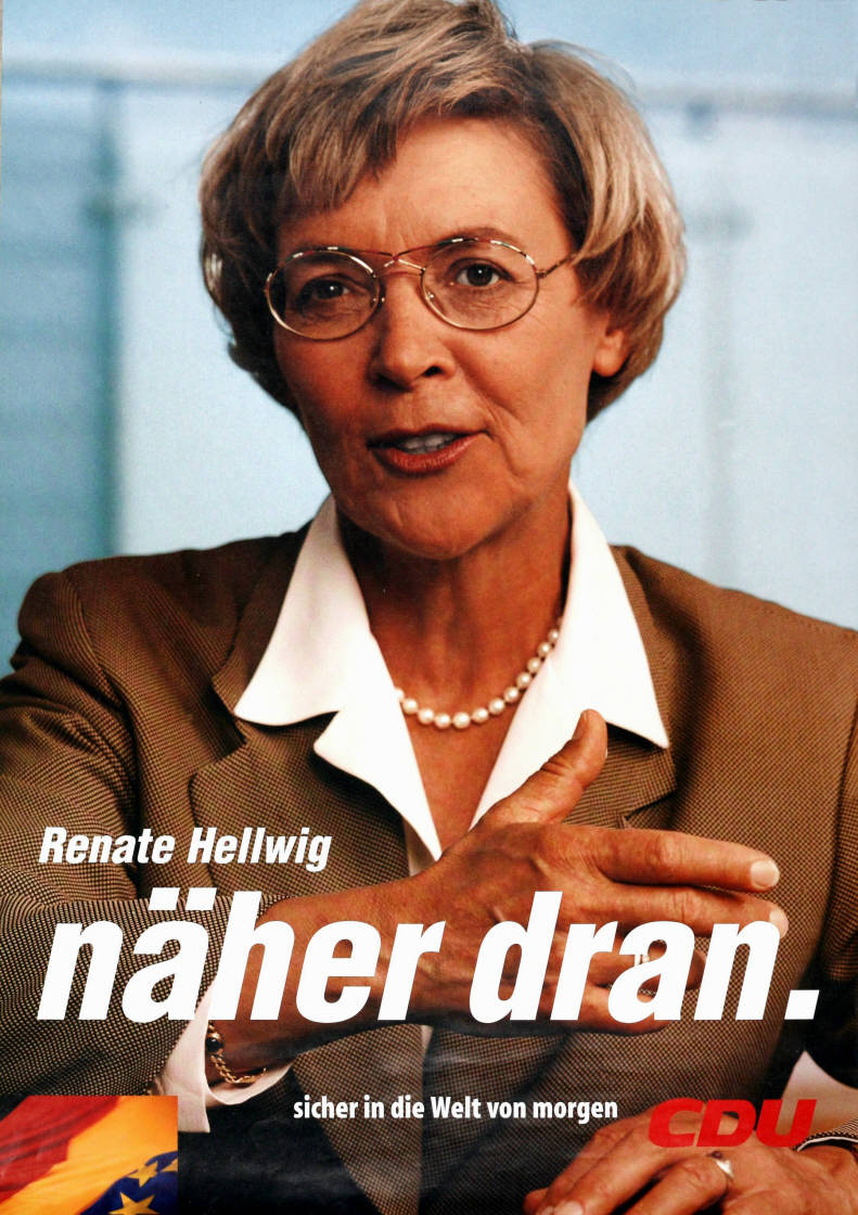 Renate Hellwig näher dran. sicher in die Welt von morgen CDUAbbildung:FotoKommentar:Vgl. Plakat Nr. 5018, anderes Foto Plakatart:Kandidaten-/Personenplakat mit PorträtObjekt-Signatur:10-001: 5019Bestand:Plakate zu Bundestagswahlen (10-001)GliederungBestand10-18:Plakate zu Bundestagswahlen (10-001) » Die 14. Bundestagswahl am 27. September 1998 » CDU » Mit PorträtfotoLizenz:KAS/ACDP 10-001: 5019 CC-BY-SA 3.0 DE